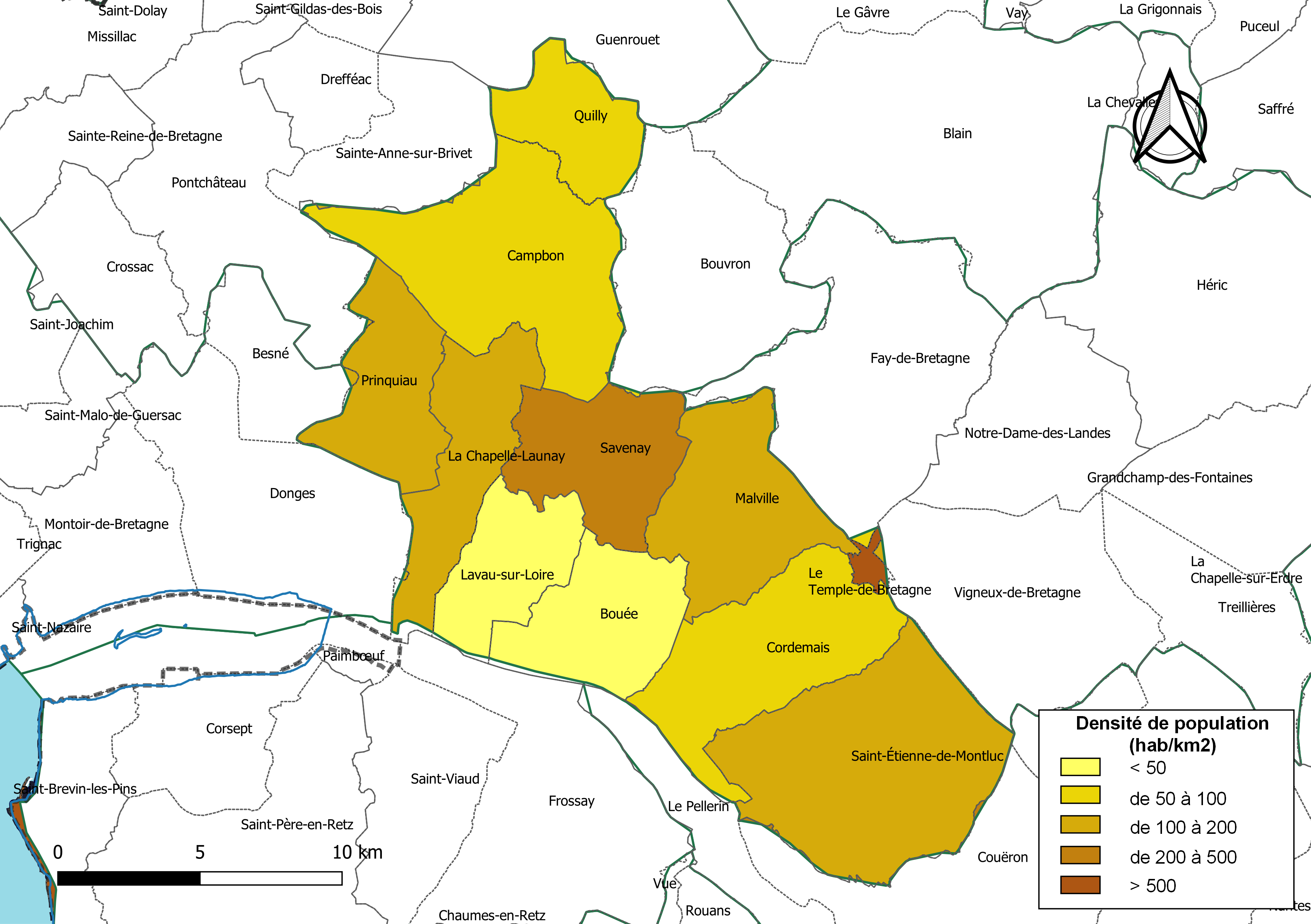 Carte des densités de population (millésimée 2016) des communes de la Communauté de communes Estuaire et Sillon, département de la Loire-Atlantique, France. Composition au 1er janvier 2019.